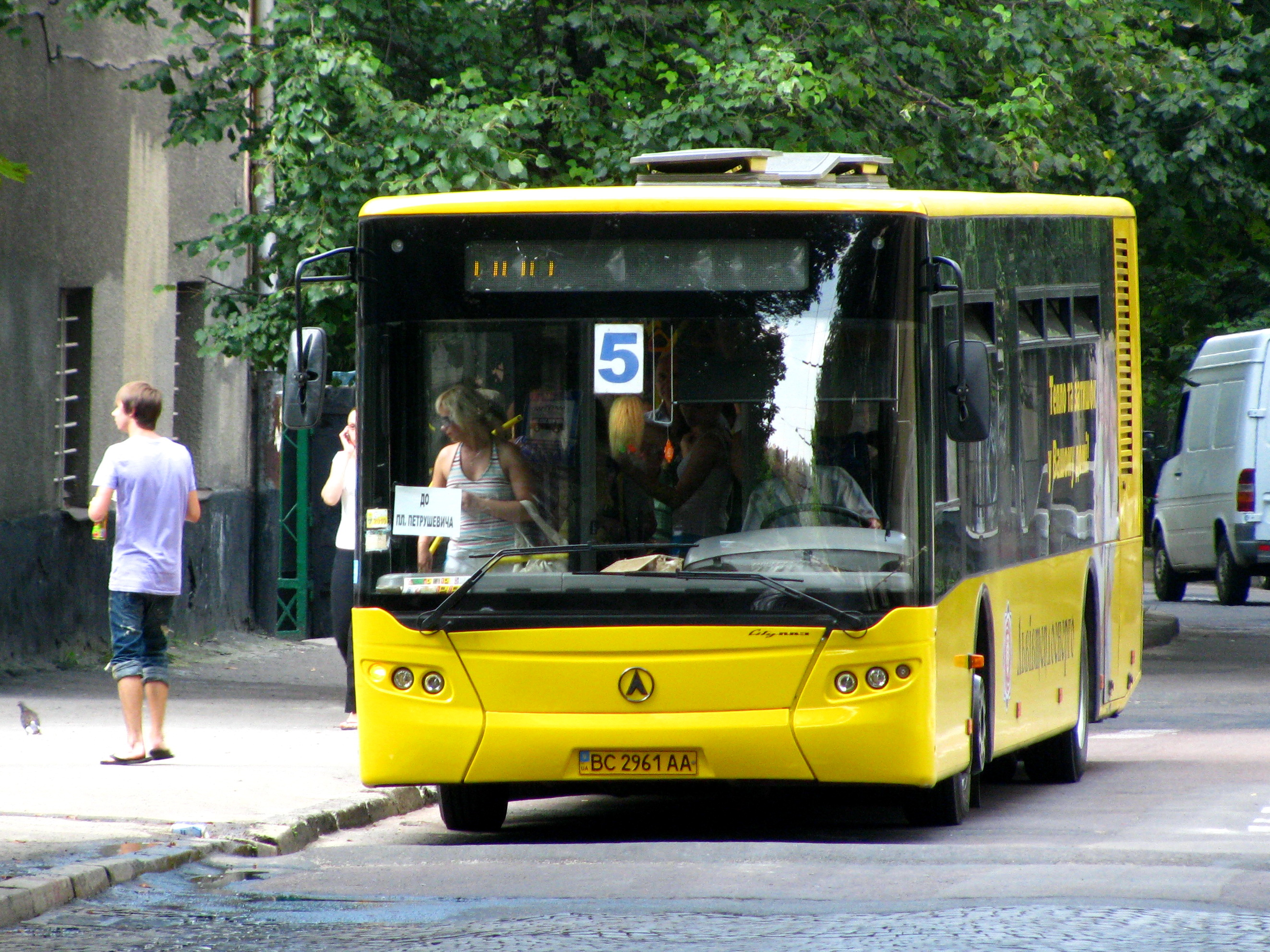 CityLAZ-12 на маршруті № 5 на вулиці Снопківській у Львові.